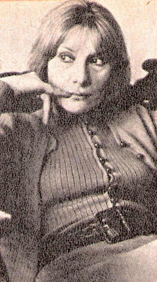 Haydeé Padilla, actriz argentina